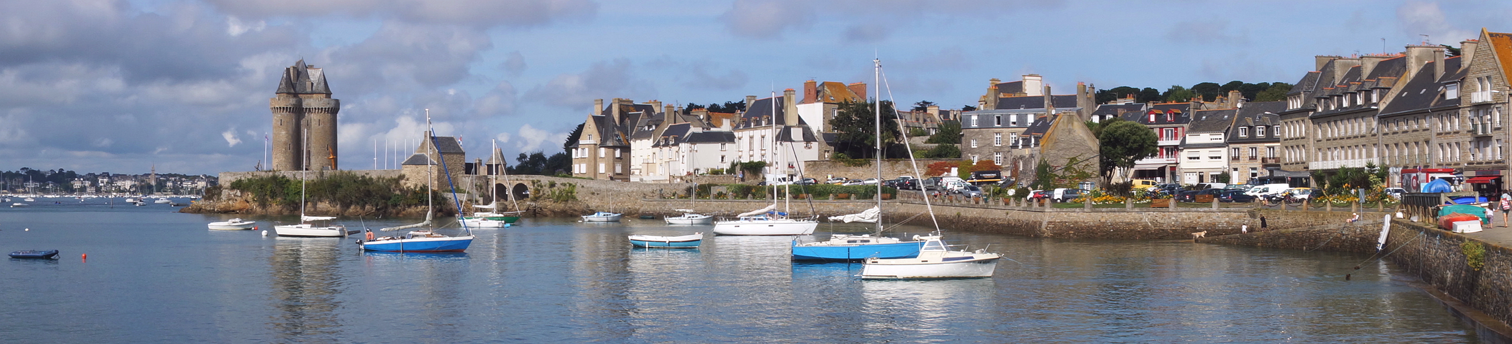 La Cité und Cap-Hornier sowie les Corbières mit dem Quai Sébastopol und dem Musée International, Saint-Malo, Frankreich - Foto 2017 Wolfgang Pehlemann DSC05184